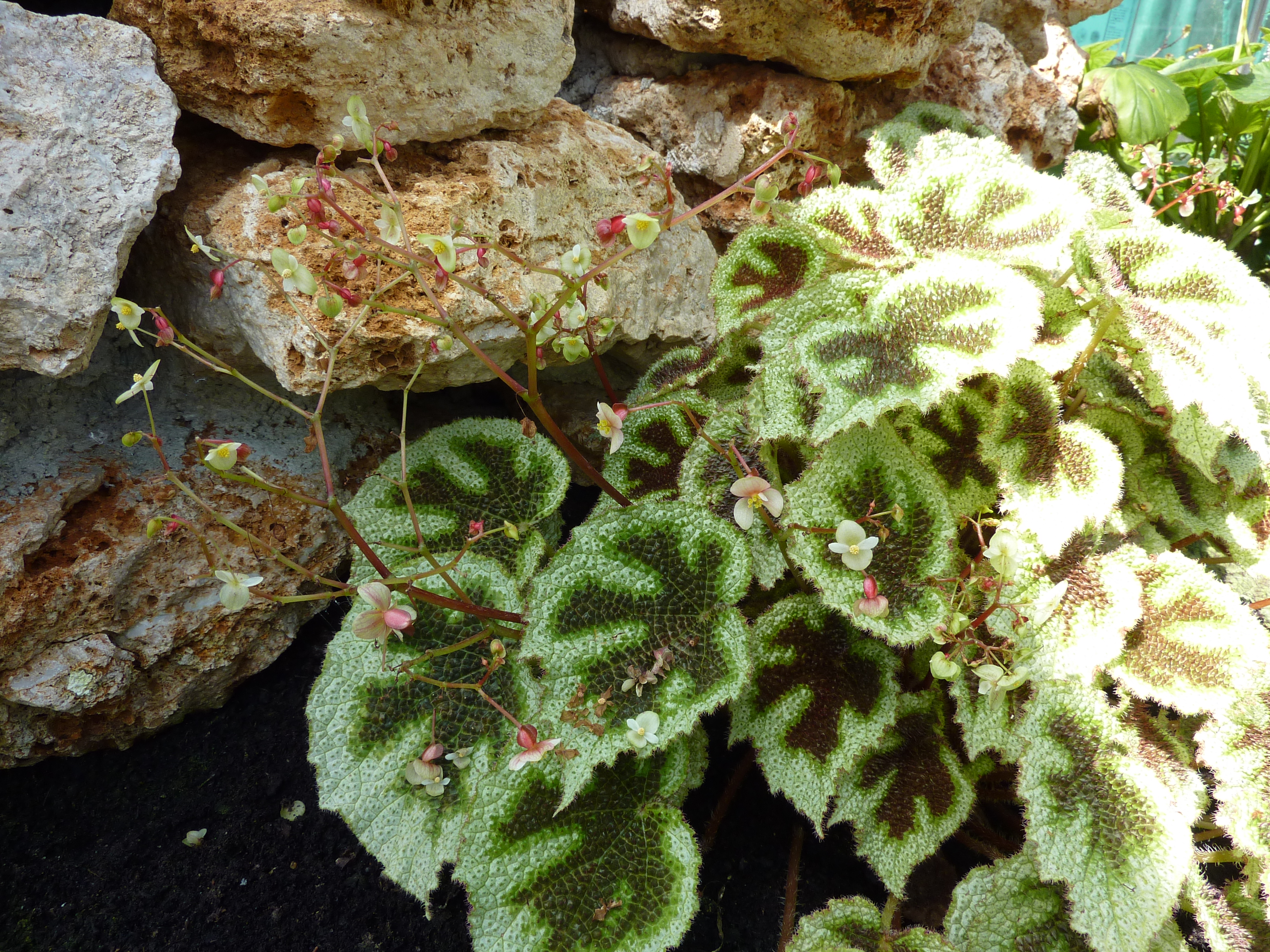 Begonia masoniana var. tricolor, serres chaudes d'Auteuil - Jardin botanique de la Ville de Paris - France